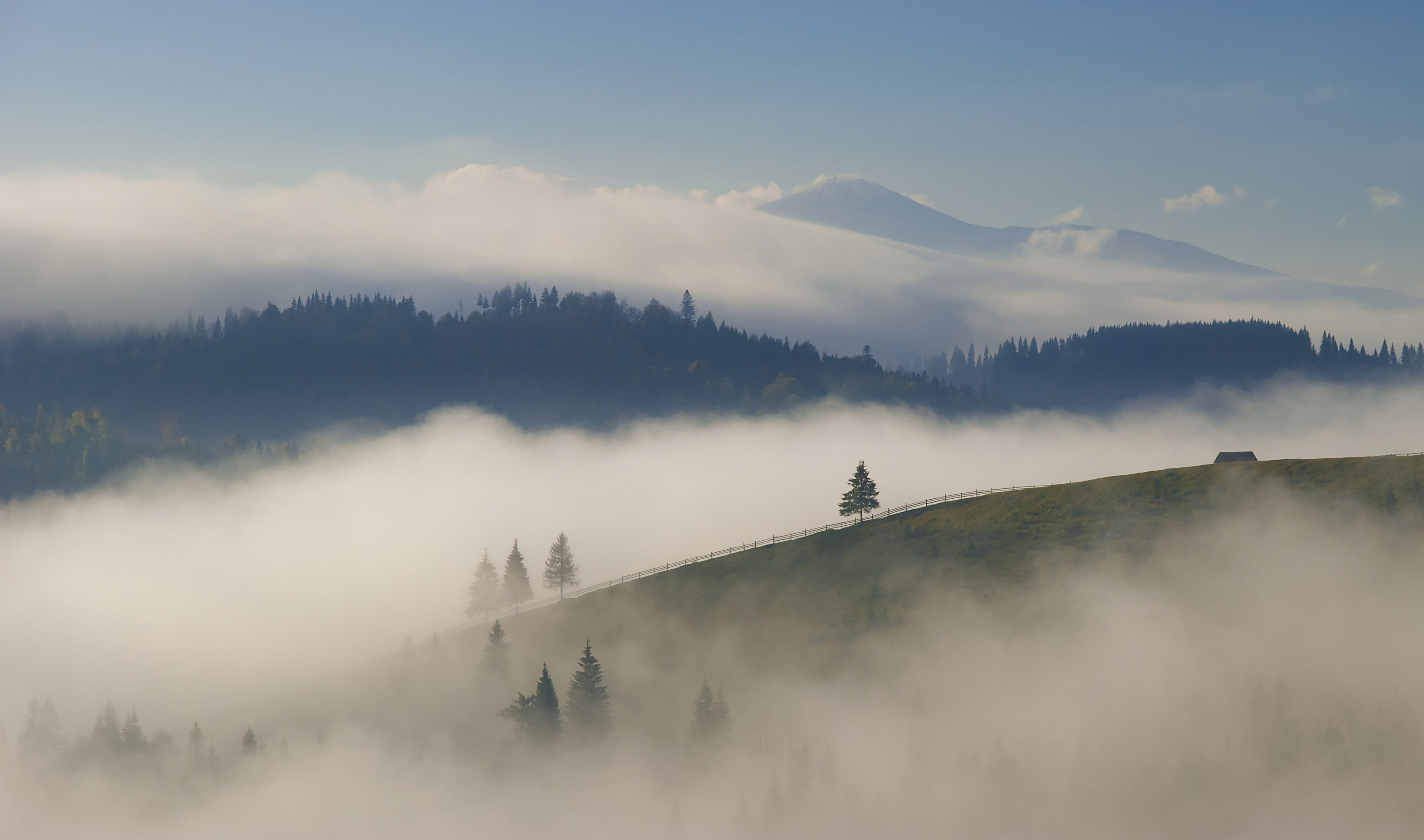 Карпатський біосферний заповідник, Рахівський, Тячівський, Хустський, Виноградівський райони